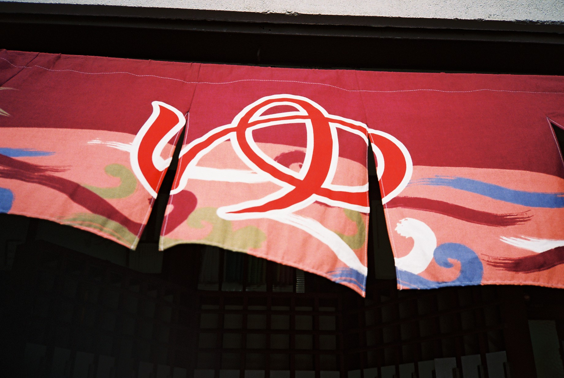 奥の湯Oku no yu public bath.